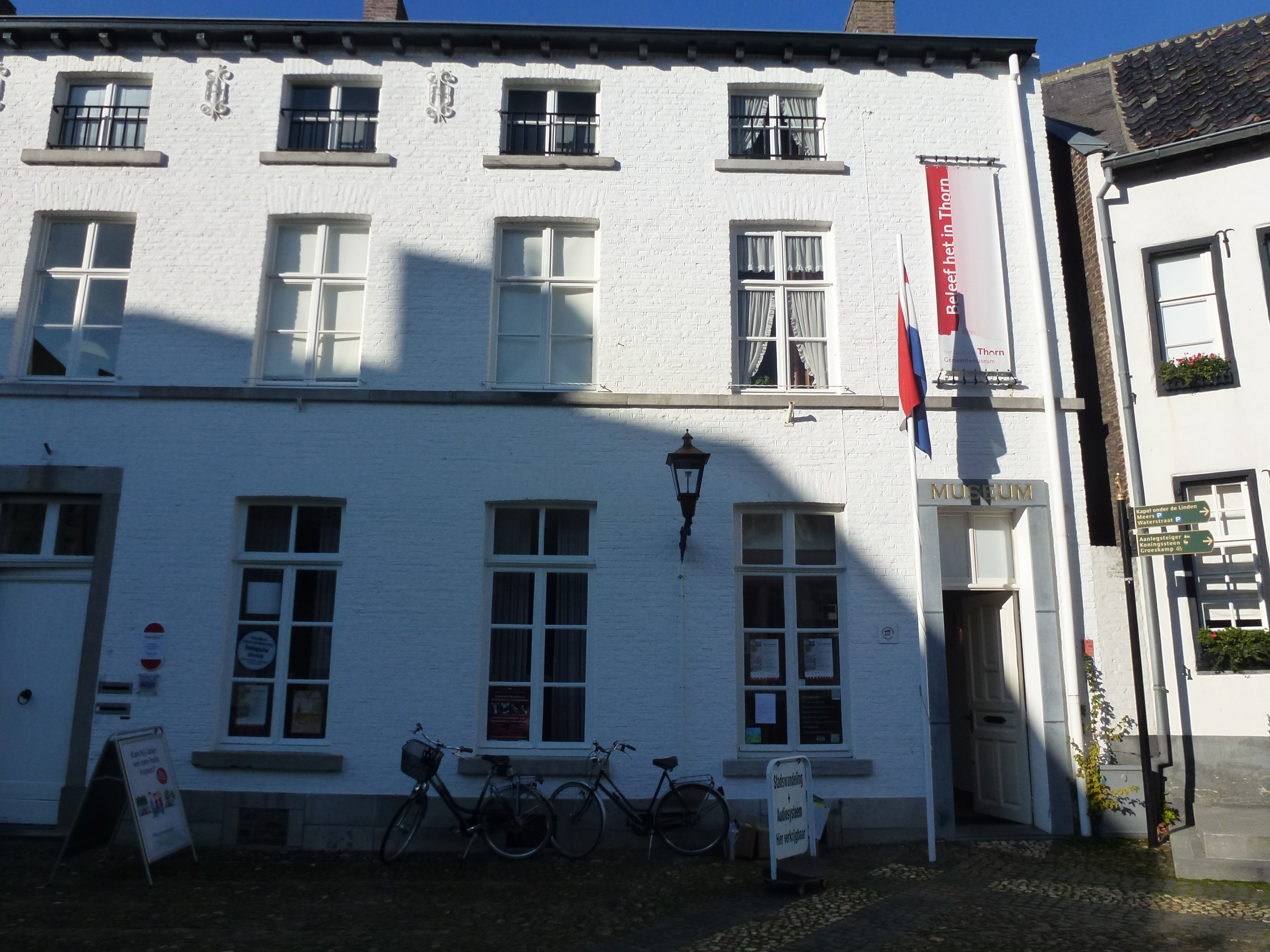 Gemeentemuseum 'Het land van Thorn', Wijngaard 14, Thorn